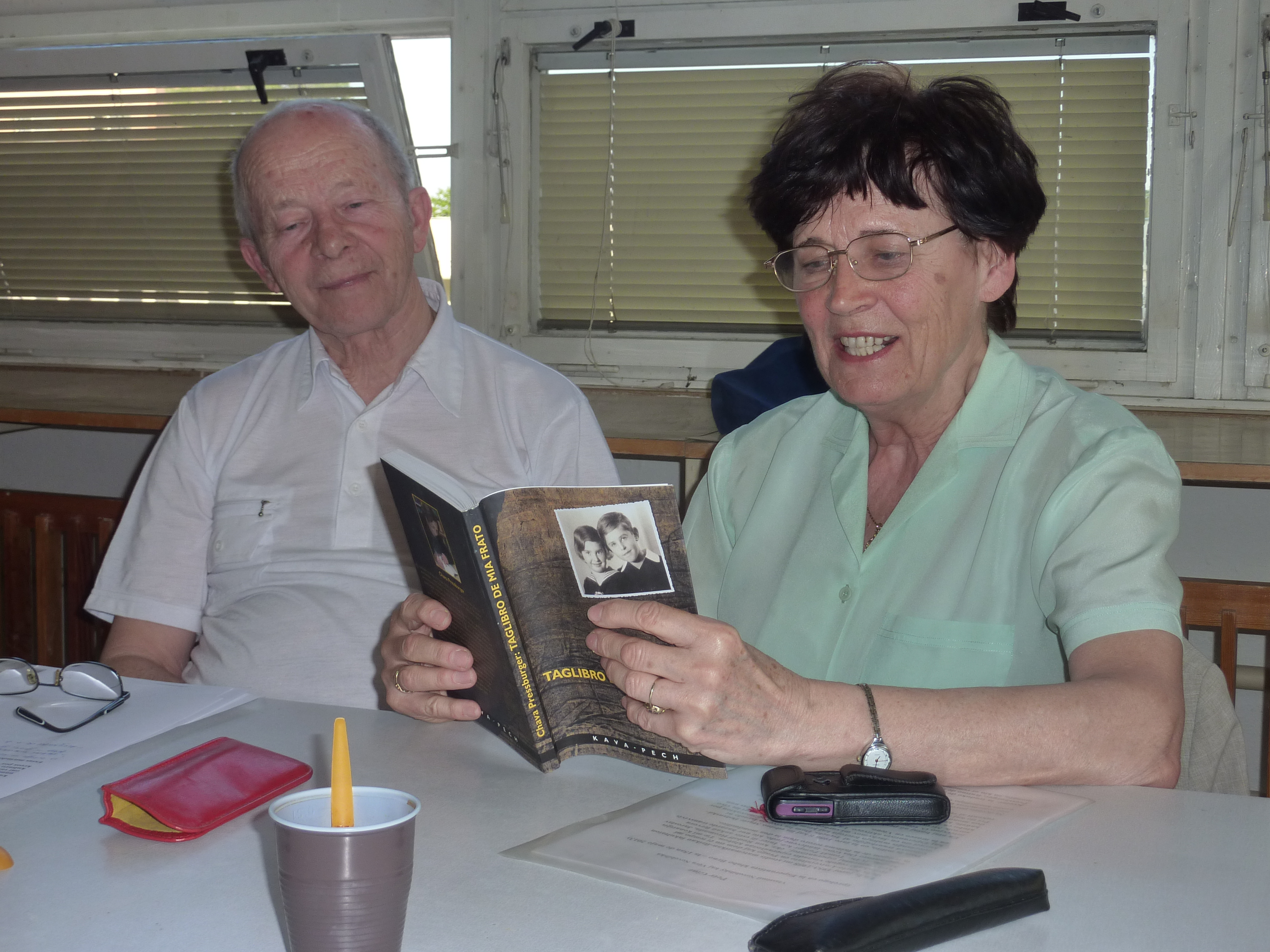 Věra Novobilská a její manžel Vlastimil Novobilský předčítají z knihy Taglibro de mia frato („Deník mého bratra“) zápisky Petra Ginze na setkání Sdružení pro mezinárodní jazyk esperanto 15.05.2013 v klubovně ÚMČ Brno-KohoutoviceEsperanto: Věra Novobilská kaj ŝia edzo Vlastimil Novobilský laŭtlegas el la libro Taglibro de mia frato (origine ĉeĥe „Deník mého bratra“) notojn de Petr Ginz al la esperanto" dum kunveno de Societo por la internacia lingvo Esperanto la 15-an de majo 2013 en klubejo de la urbodistrikto Brno-Kohoutovice